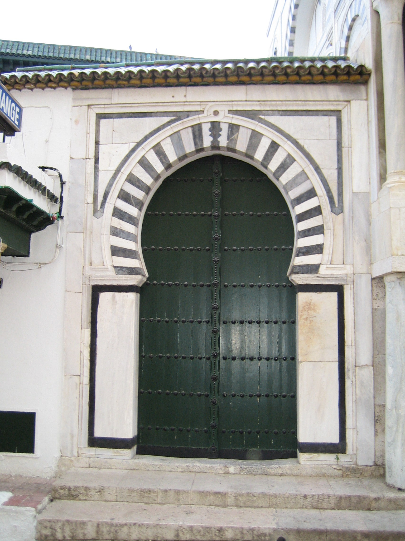 Hufeisenbogen.